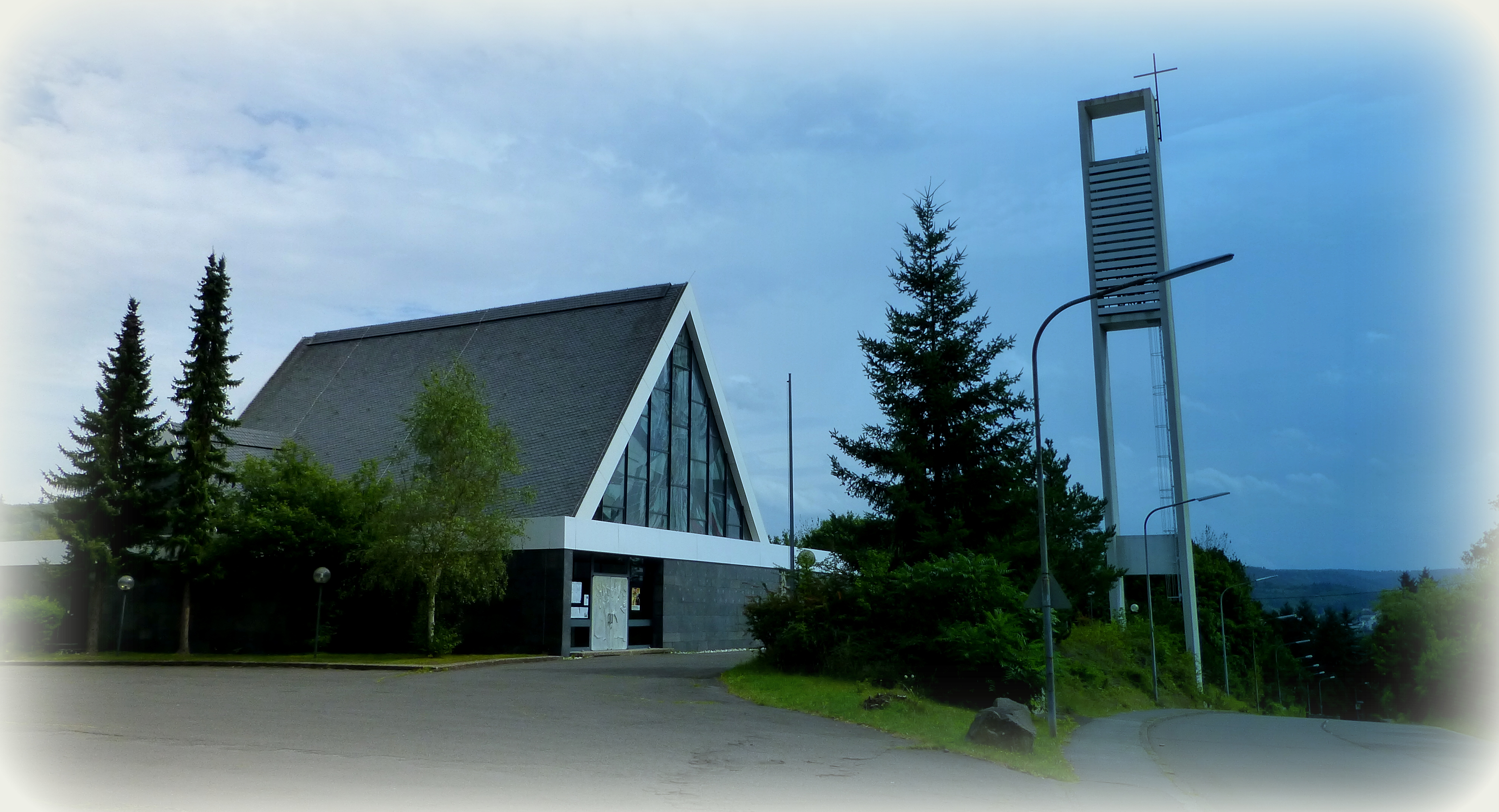 Idar-Oberstein – katholische Garnisonskirche St. Barbara